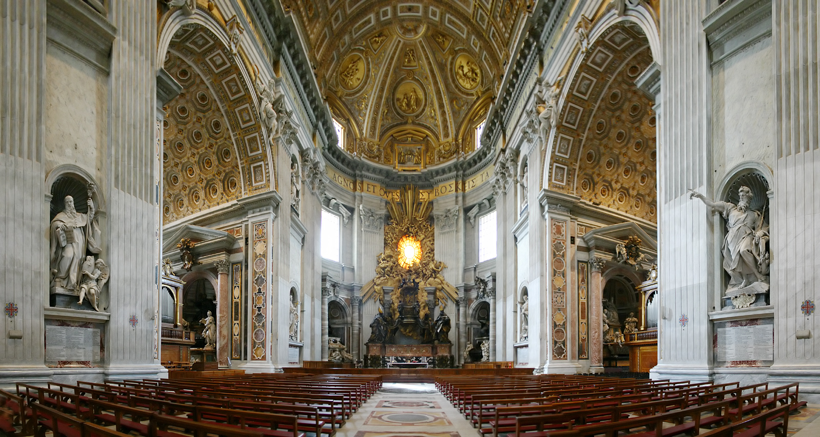 Blick in den Chorraum von St. Peter, Rom